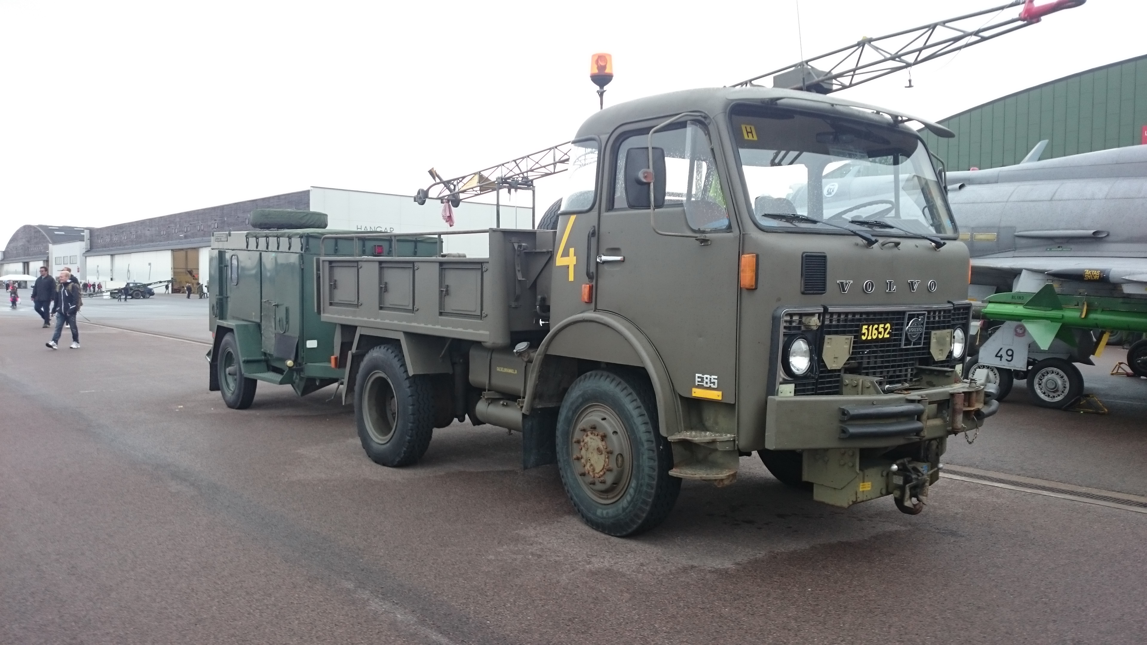 Uppställning av fordon för klargörning av JA-37 Viggen enligt flygbassystemet BAS-90 på flygdagarna 2016 på Malmen